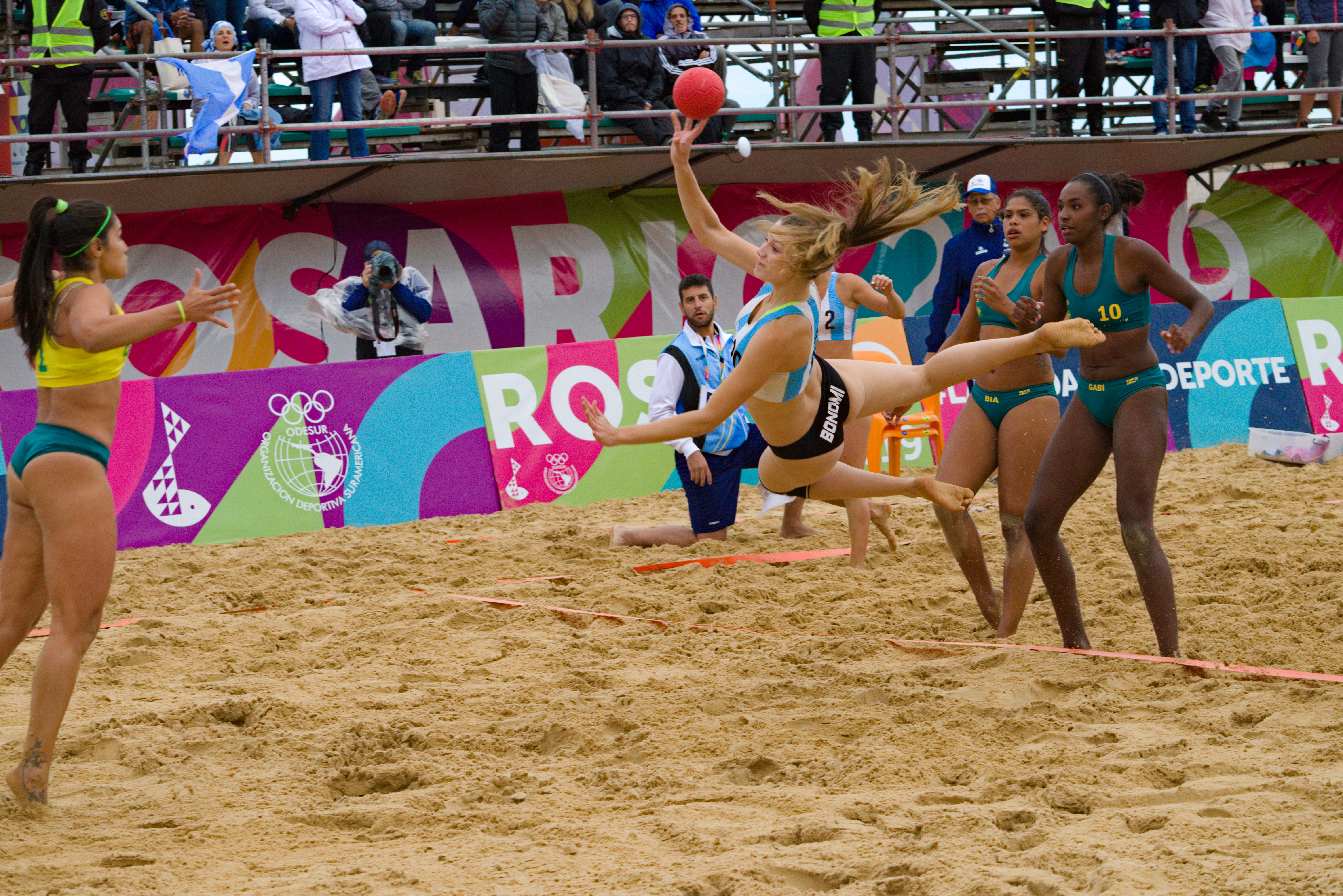 Partido por la final femenina de handball entre Argentina y Brasil en los Juegos Suramericanos de Playa 2019